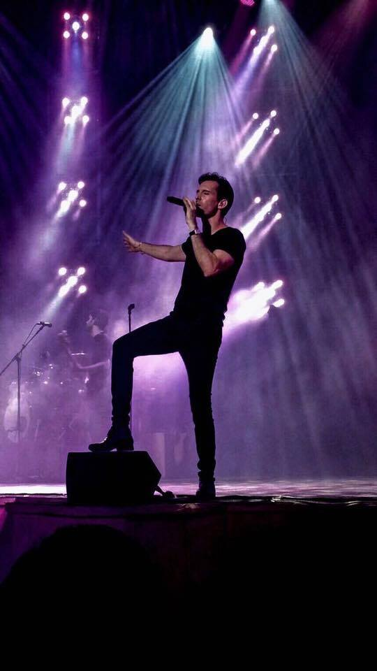 עברי לידר